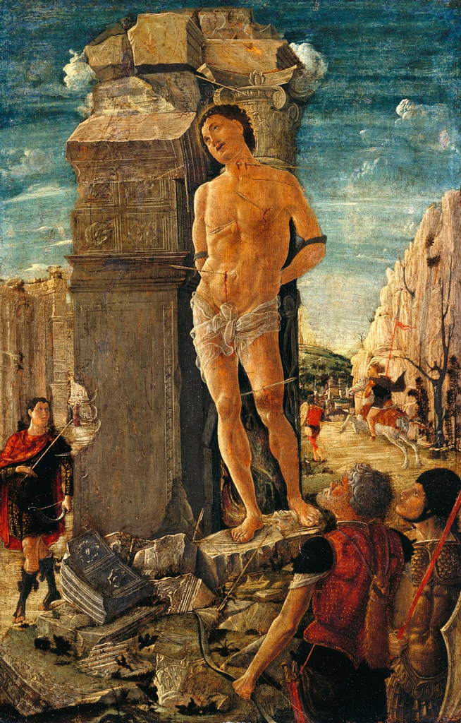 Saint Sebastianlabel QS:Lde,"St. Sebastian"label QS:Len,"Saint Sebastian"label QS:Lit,"San Sebastiano"